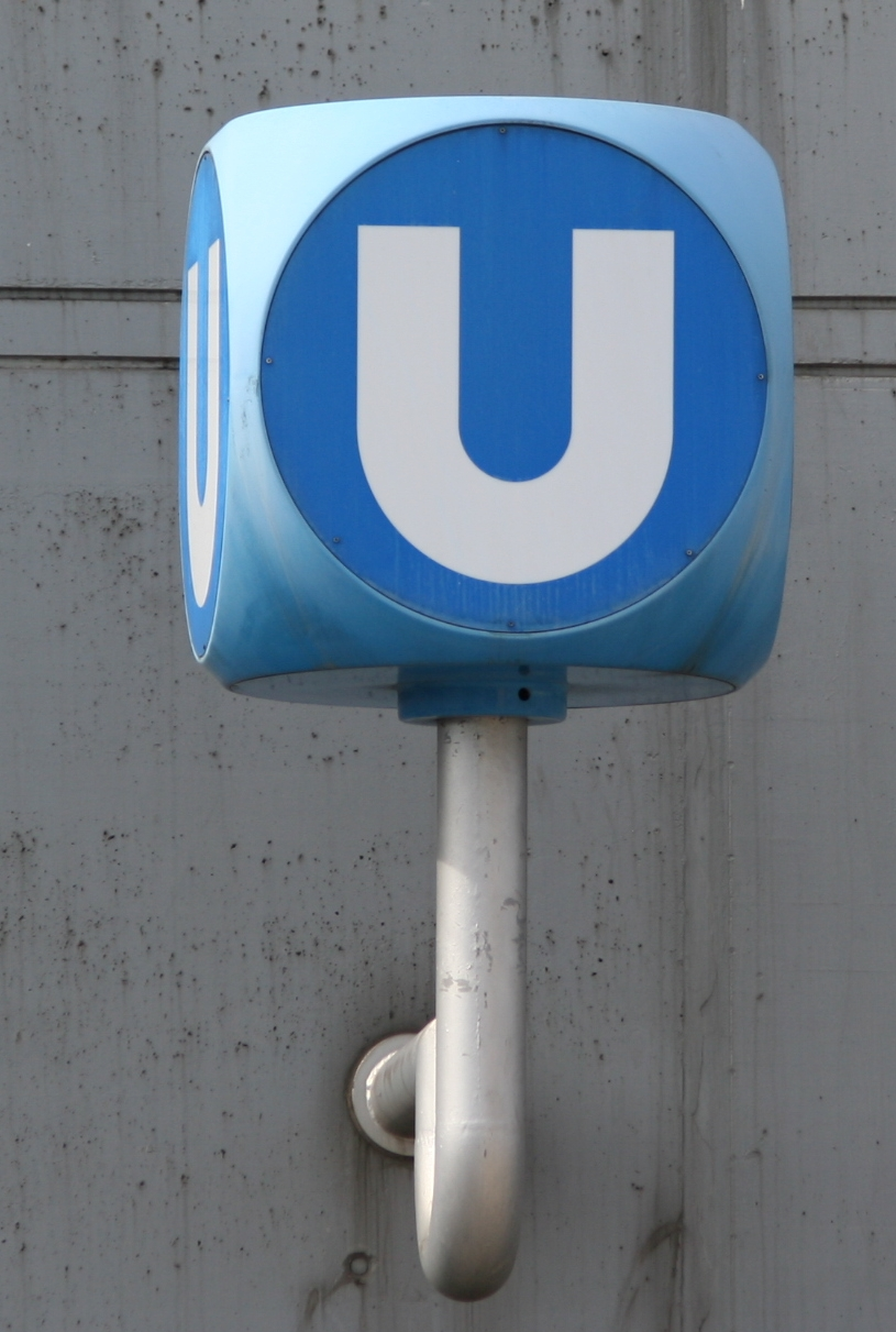 U-Bahn Zeichen in Wien bei der Station Spittelau. Kennzeichnung der Stationen der Wiener U-Bahn.